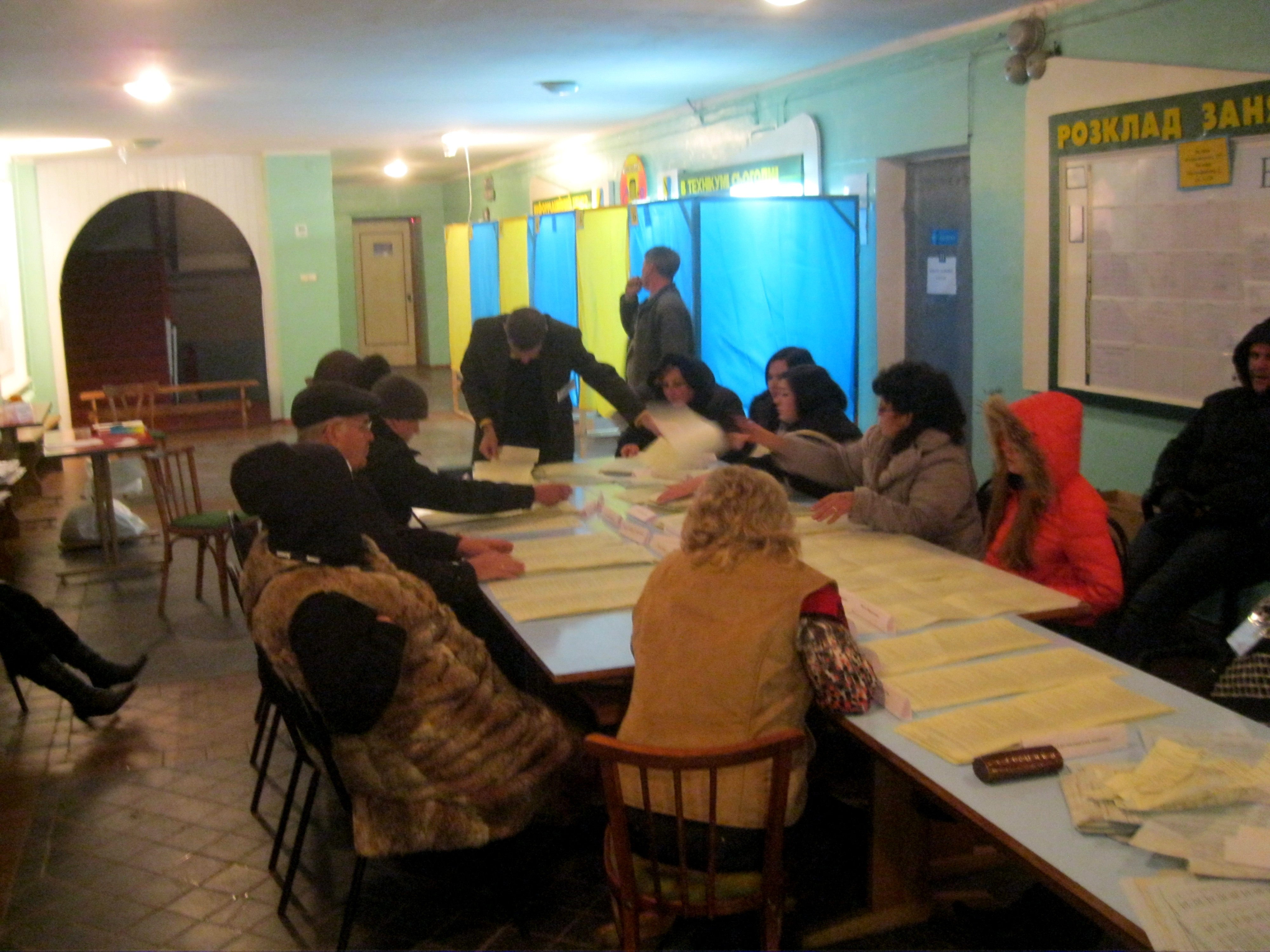 Підрахунок голосів дільничною виборчою комісією на парламентських виборах 2014 року у Білій Церкві.